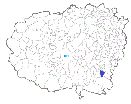 Posizione del comune nella provincia di Cuneo